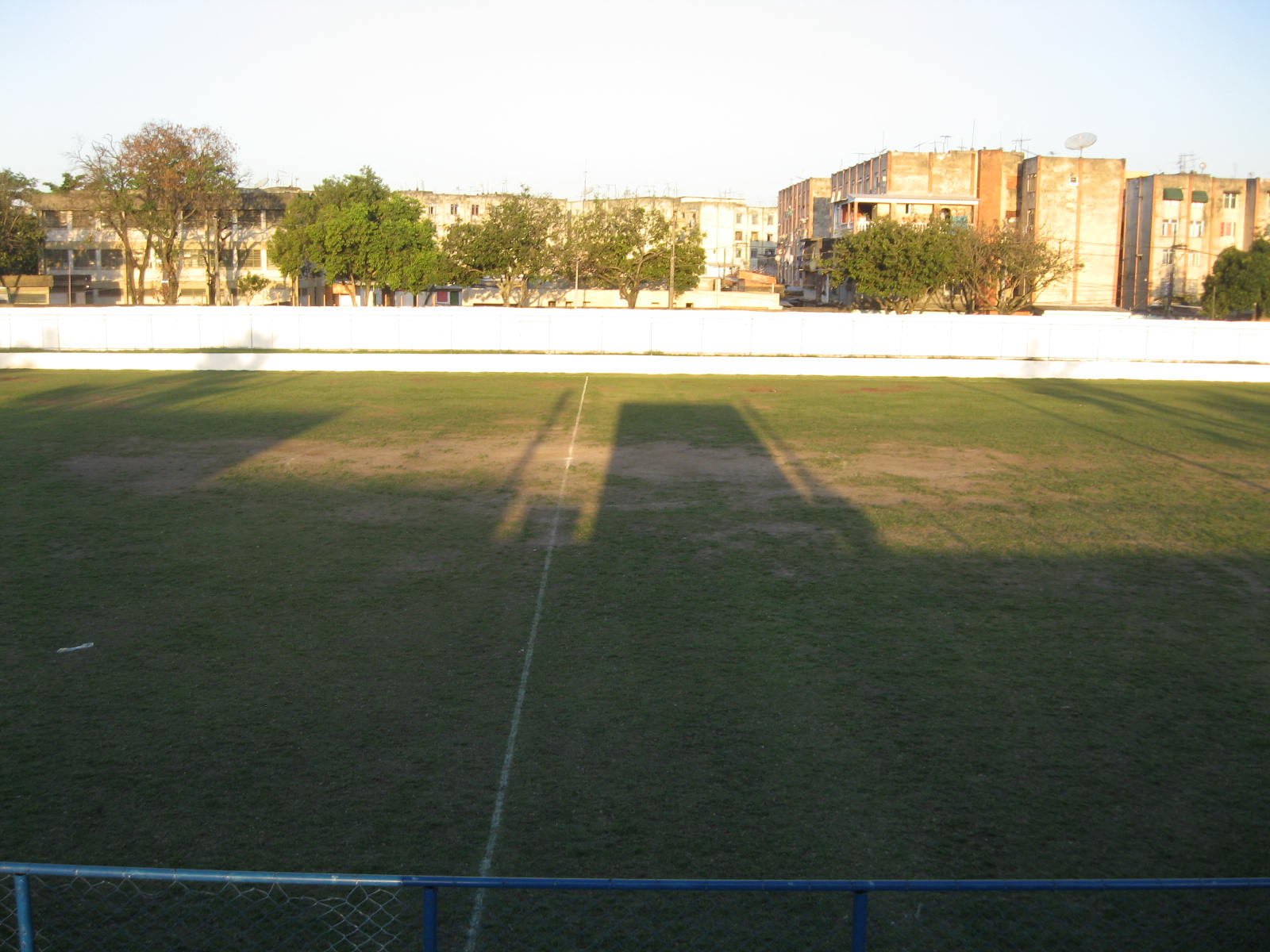 Estádio João Francisco dos Santos, do Céres Futebol Clube.